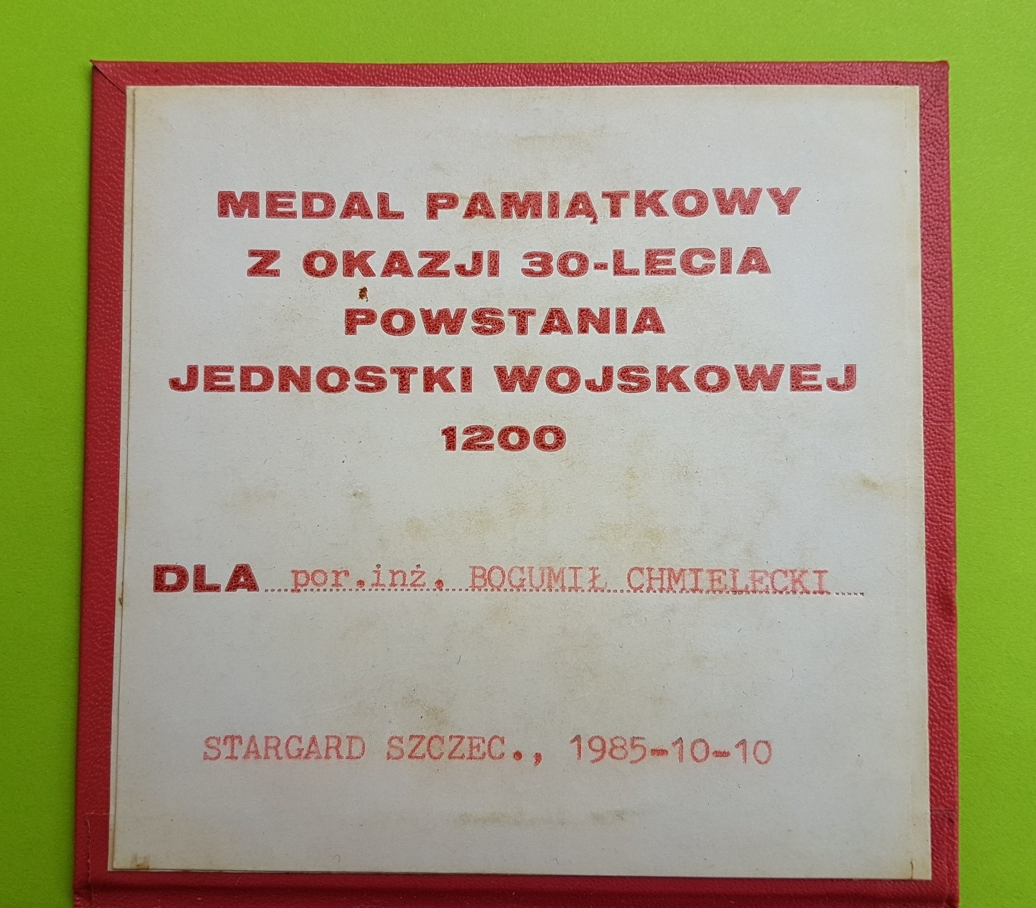 Stargard Szczeciński, 10.10.1985r. Medal Pamiątkowy z okazji powstania JW 1200 dla por. inż. Bogumiła Chmieleckiego